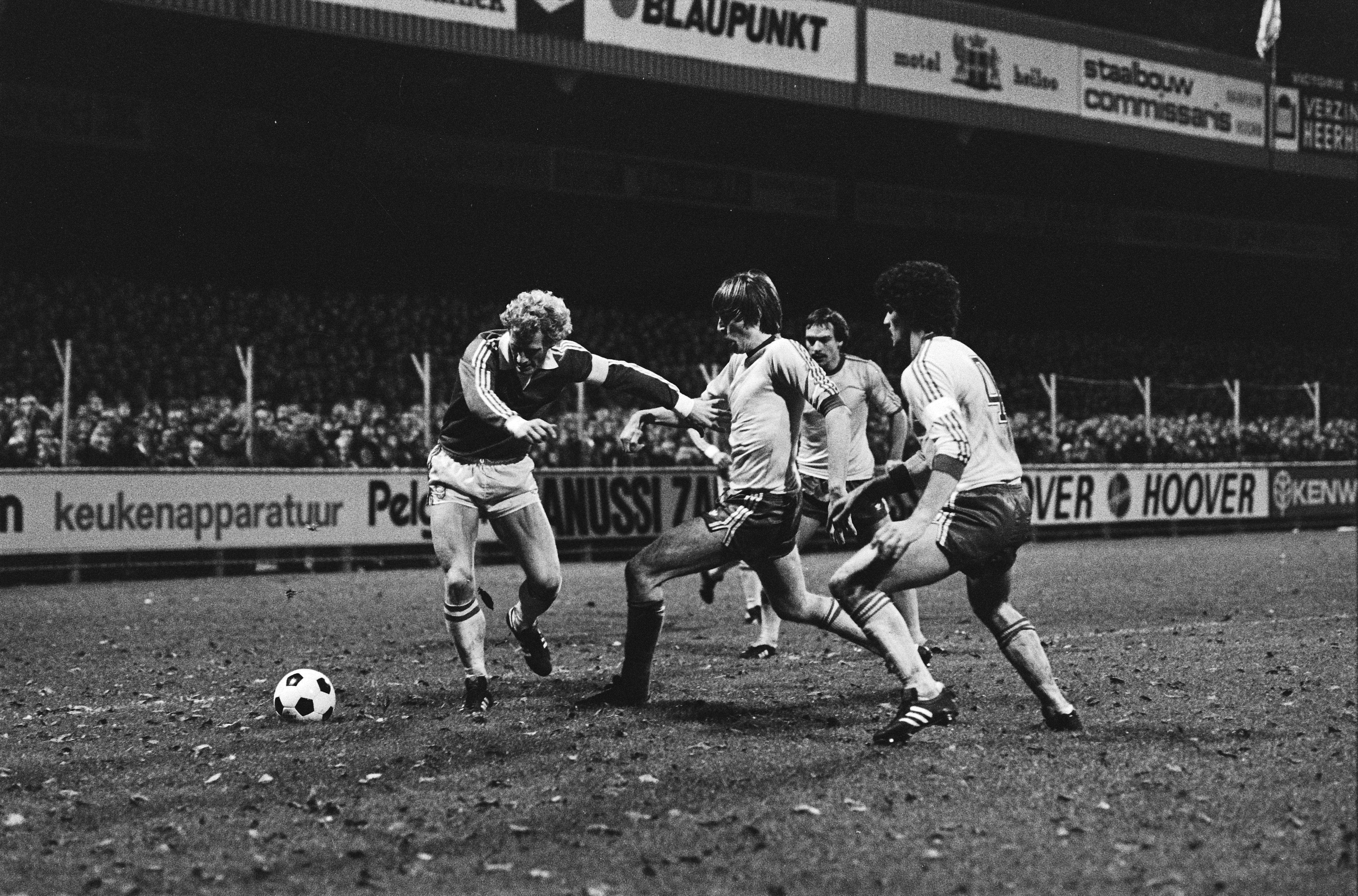 Match de football AZ'67 - Feyenoord à Alkmaar. De gauche à droite Kees Kist (AZ'67), Ivan Nielsen, Jan van Deinsen et Michel van de Korput (tous du Feyenoord). Photographie par Koen Suyk / Anefo.